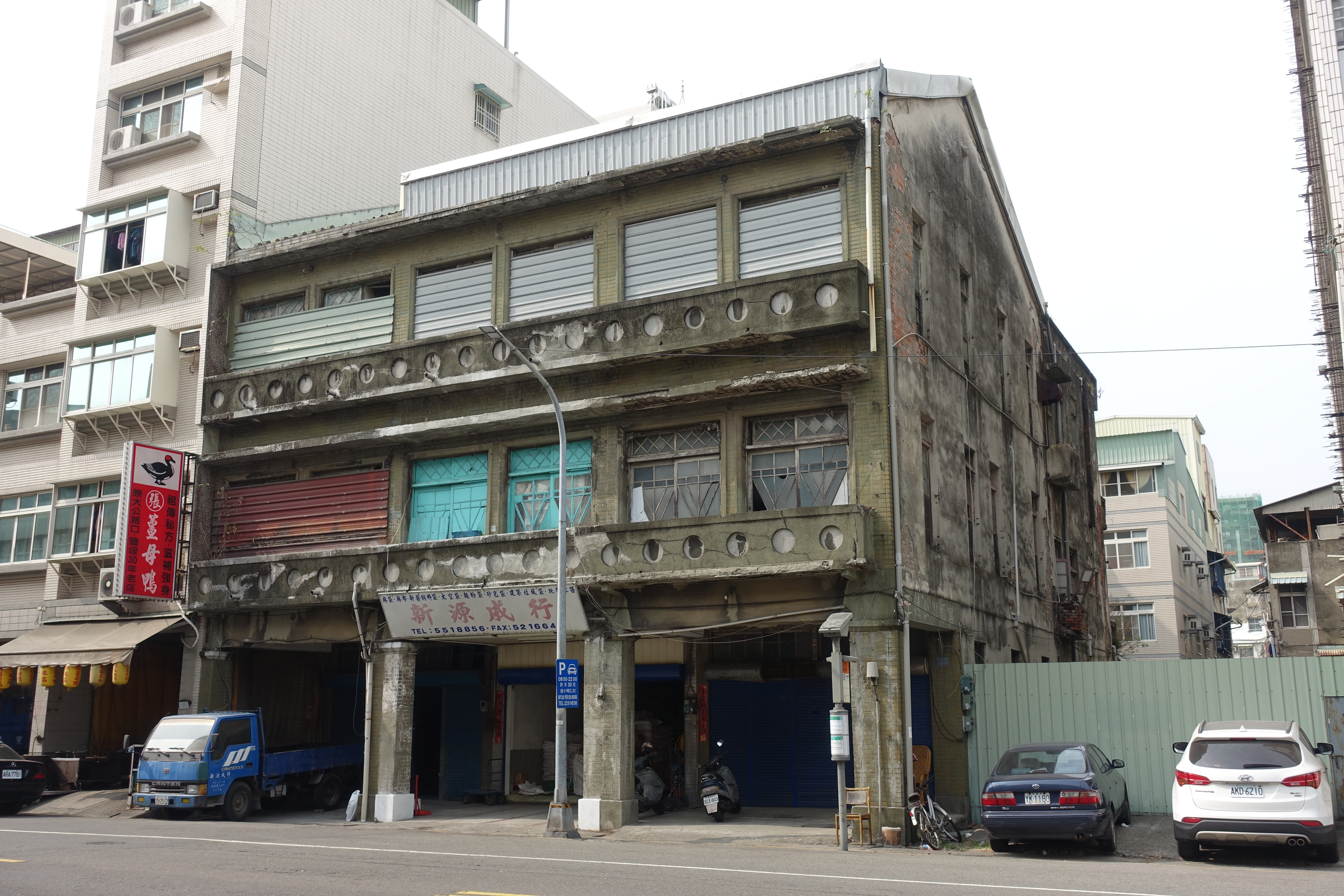 中文（台灣）: 胡知頭經營的東洋旅社